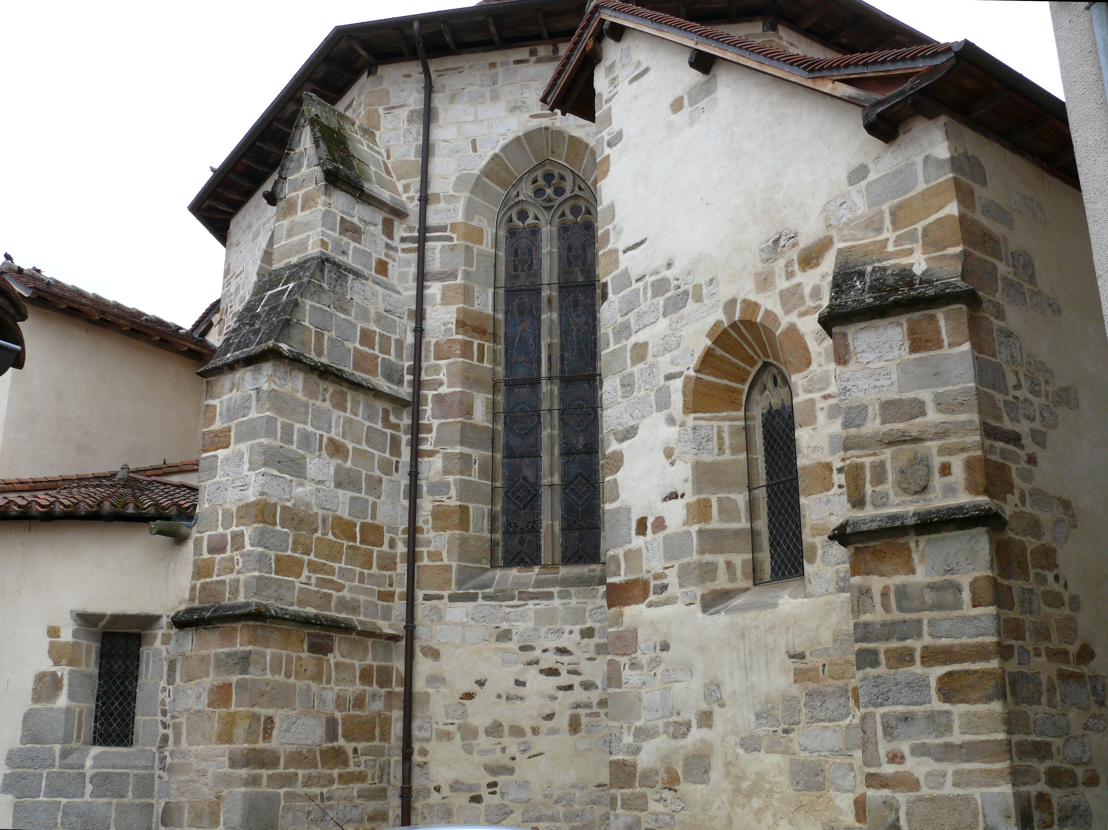 Maurs - Abbatiale - Chevet